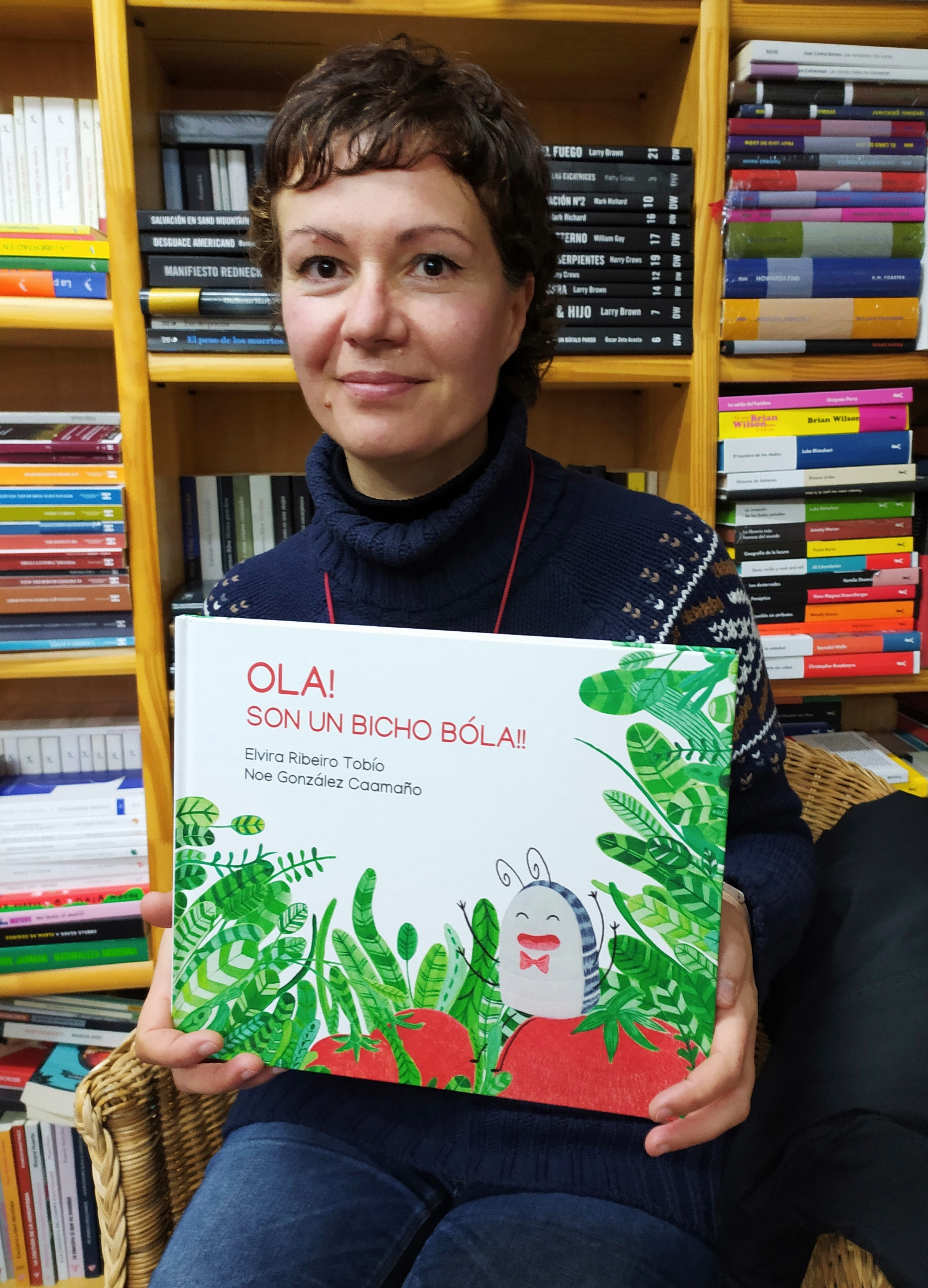 Elvira Ribeiro Tobío, escritora galega, na Libraría Paz de Pontevedra